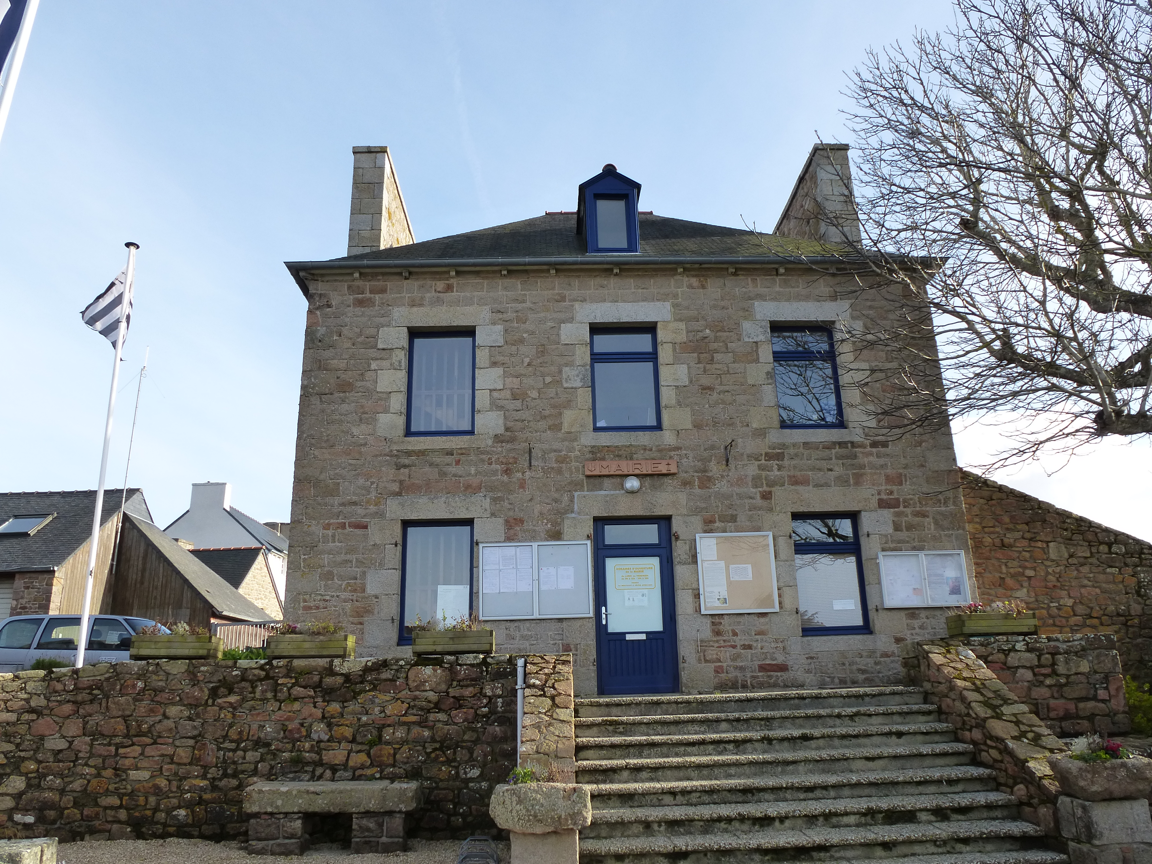 la mairie de l'ile de brehat